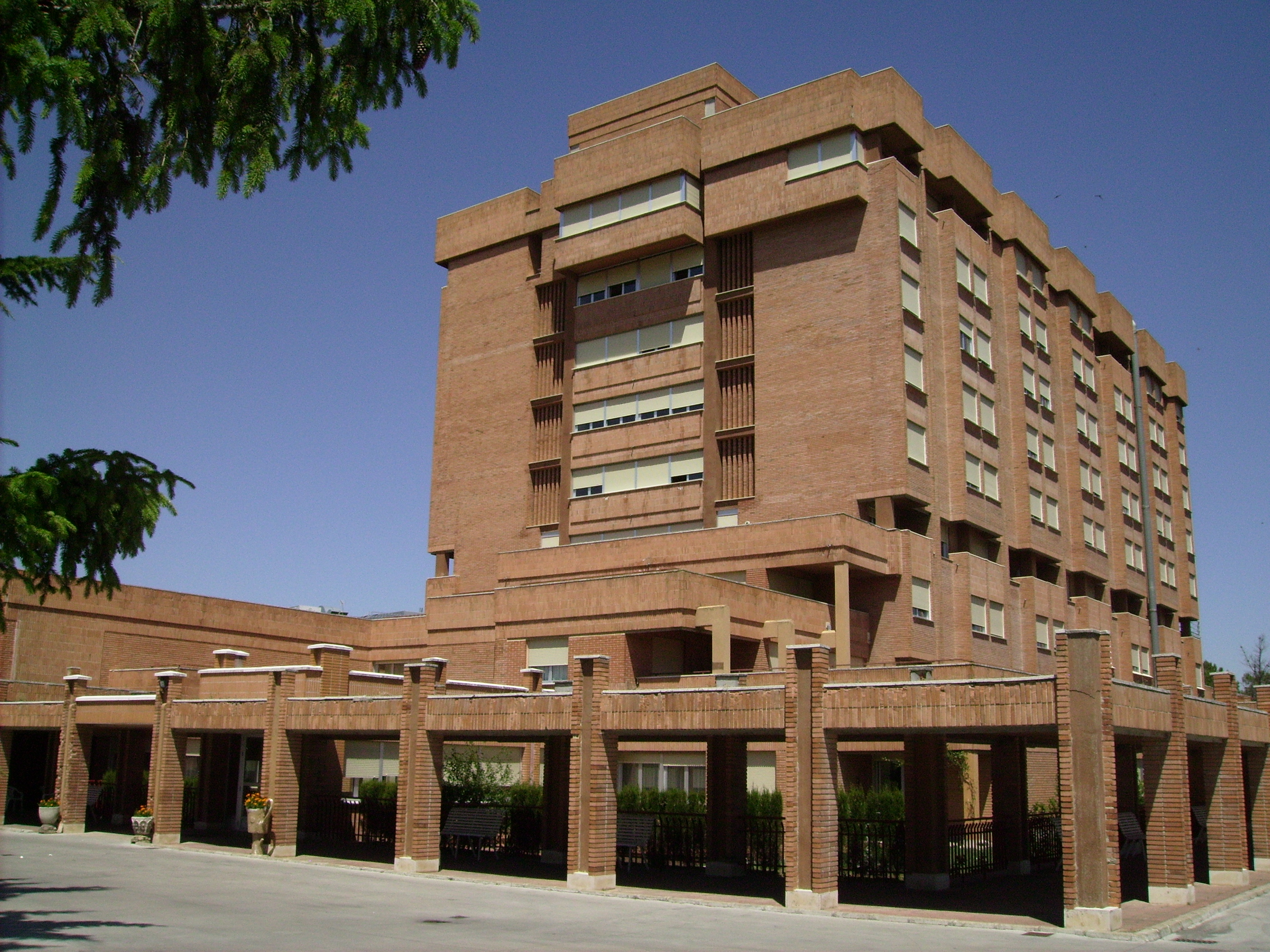 Residencia de las Hermanitas de los Pobres en Valladolid (España).